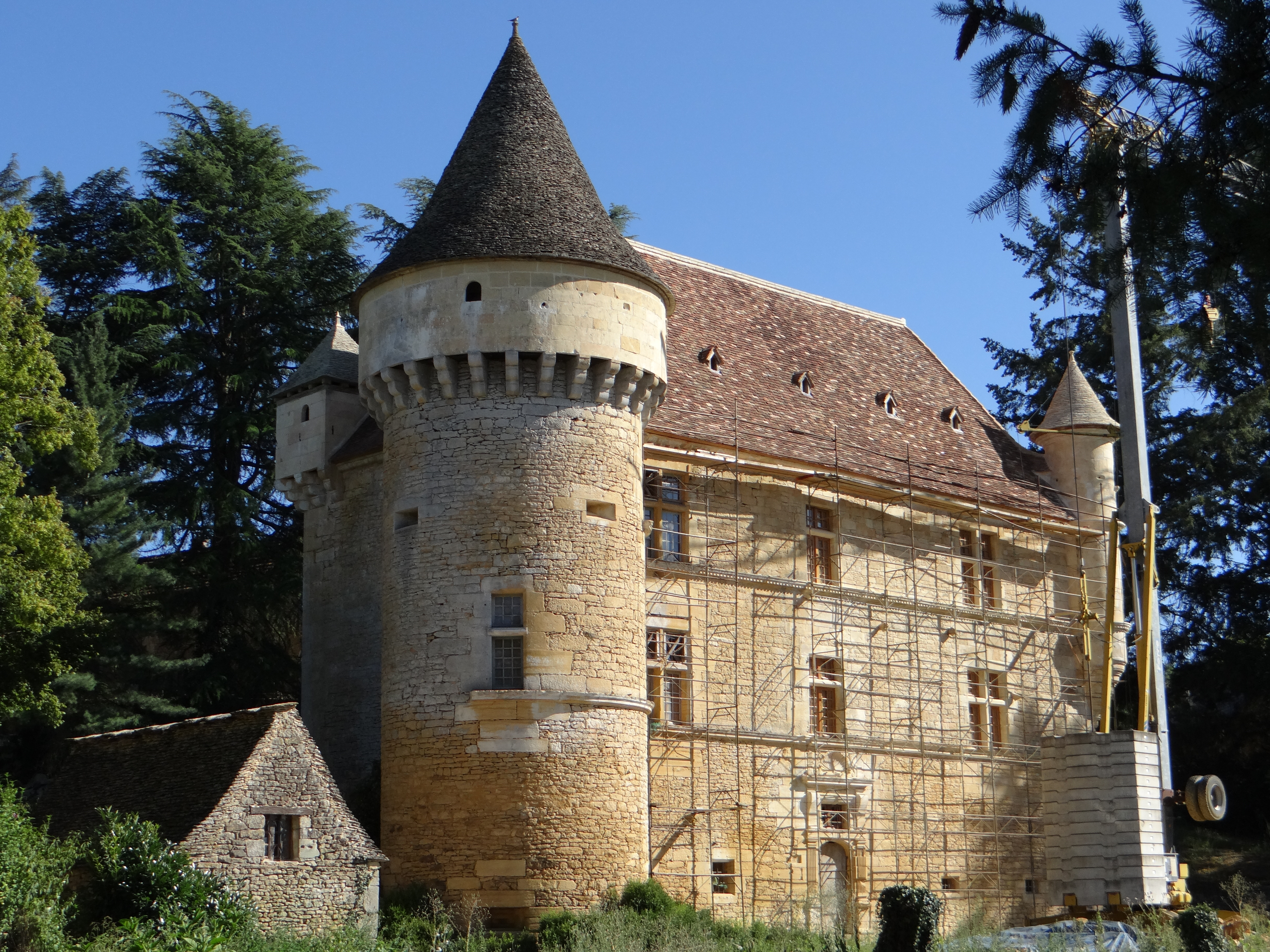 Prats-de-Carlux - Le Sirey - Château du Sirey en cours de restauration